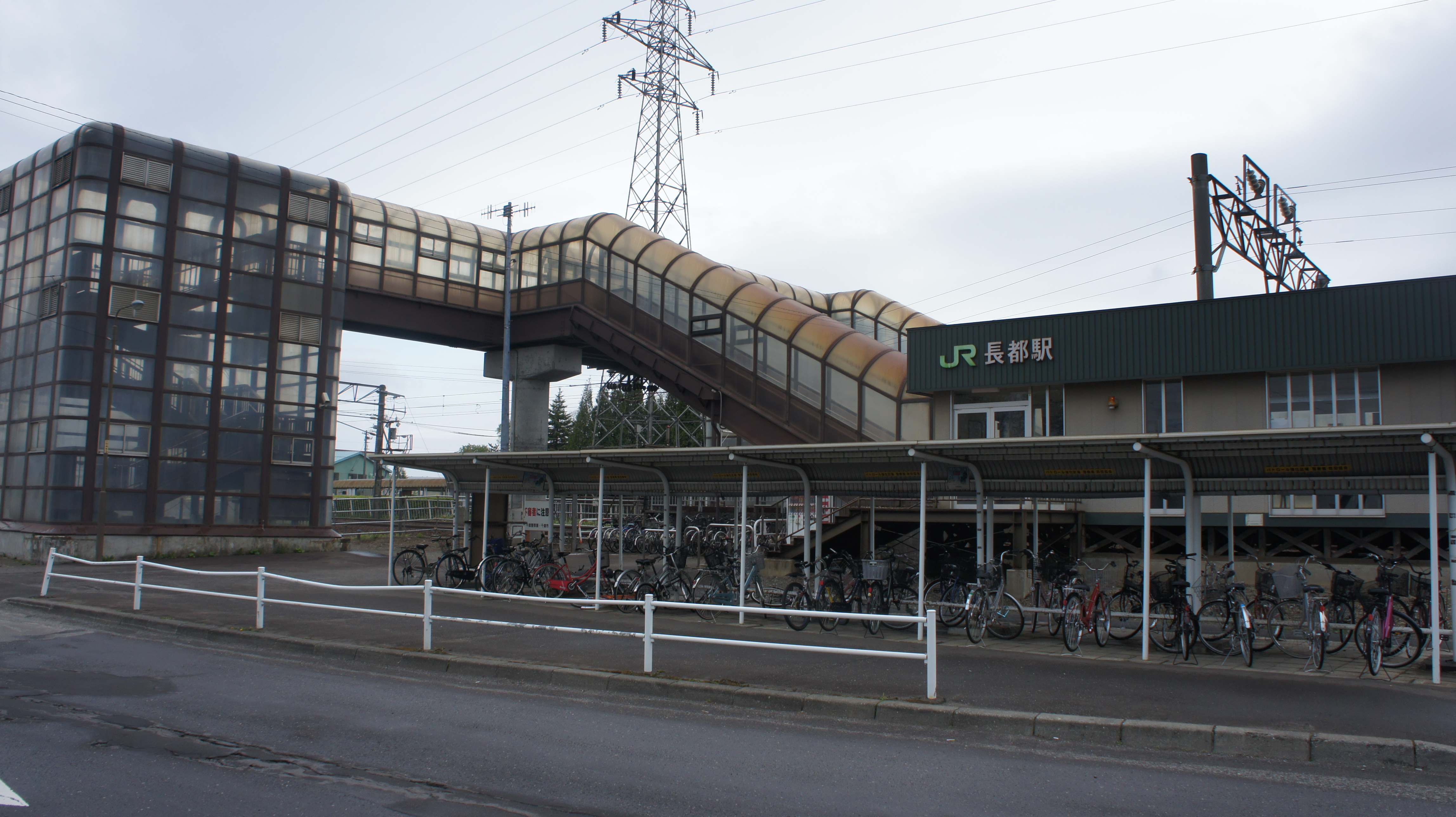 JR千歳線・長都駅の駅舎（東口） Sony NEX-3